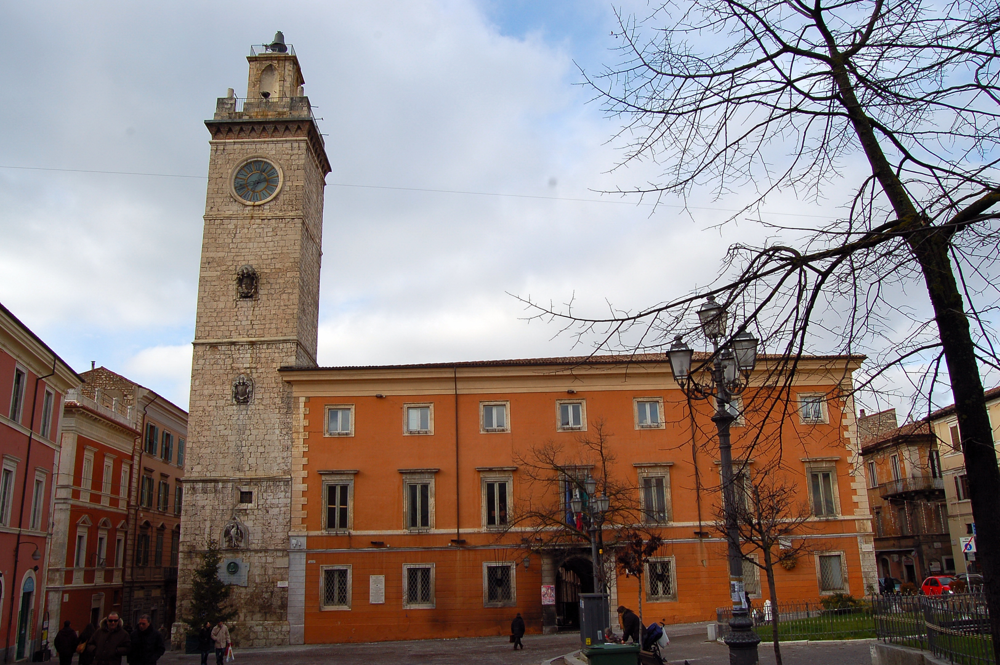 67100 L'Aquila, Italy